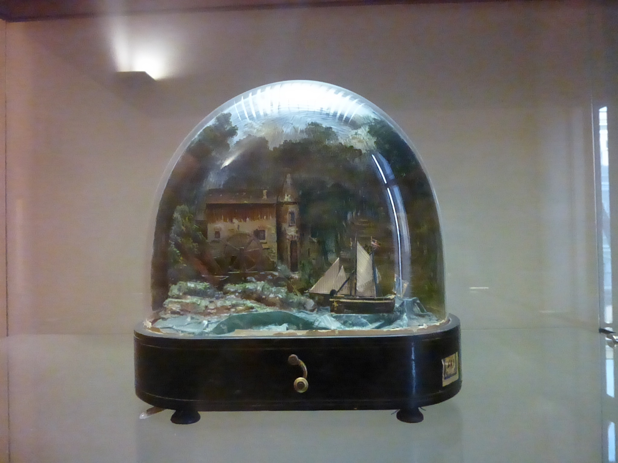 Roma, Museo nazionale degli strumenti musicali. Carillon con barca a vela (XIX sec., coll. Gorga)